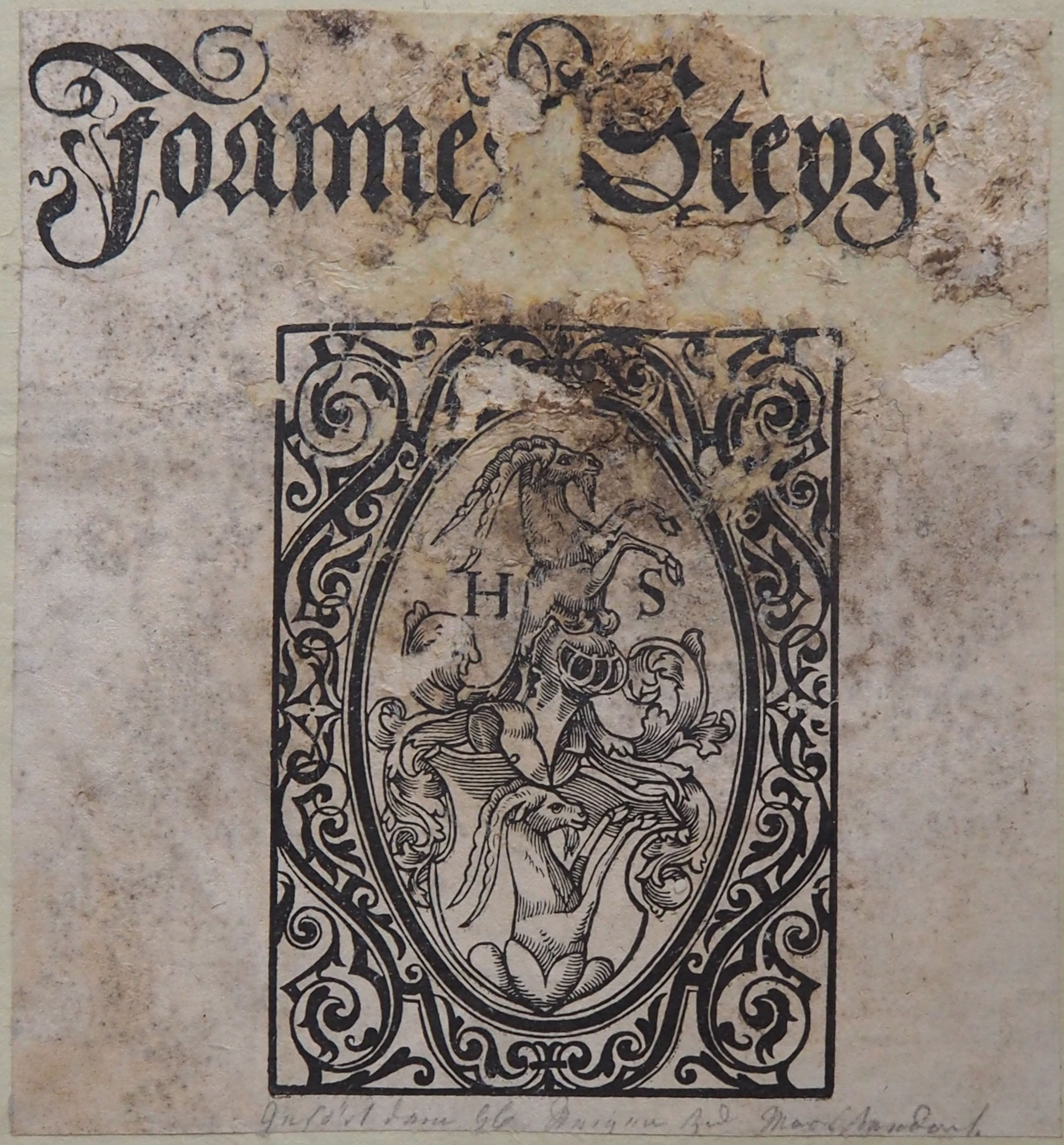 Exlibris Hans Steiger (Fragment).